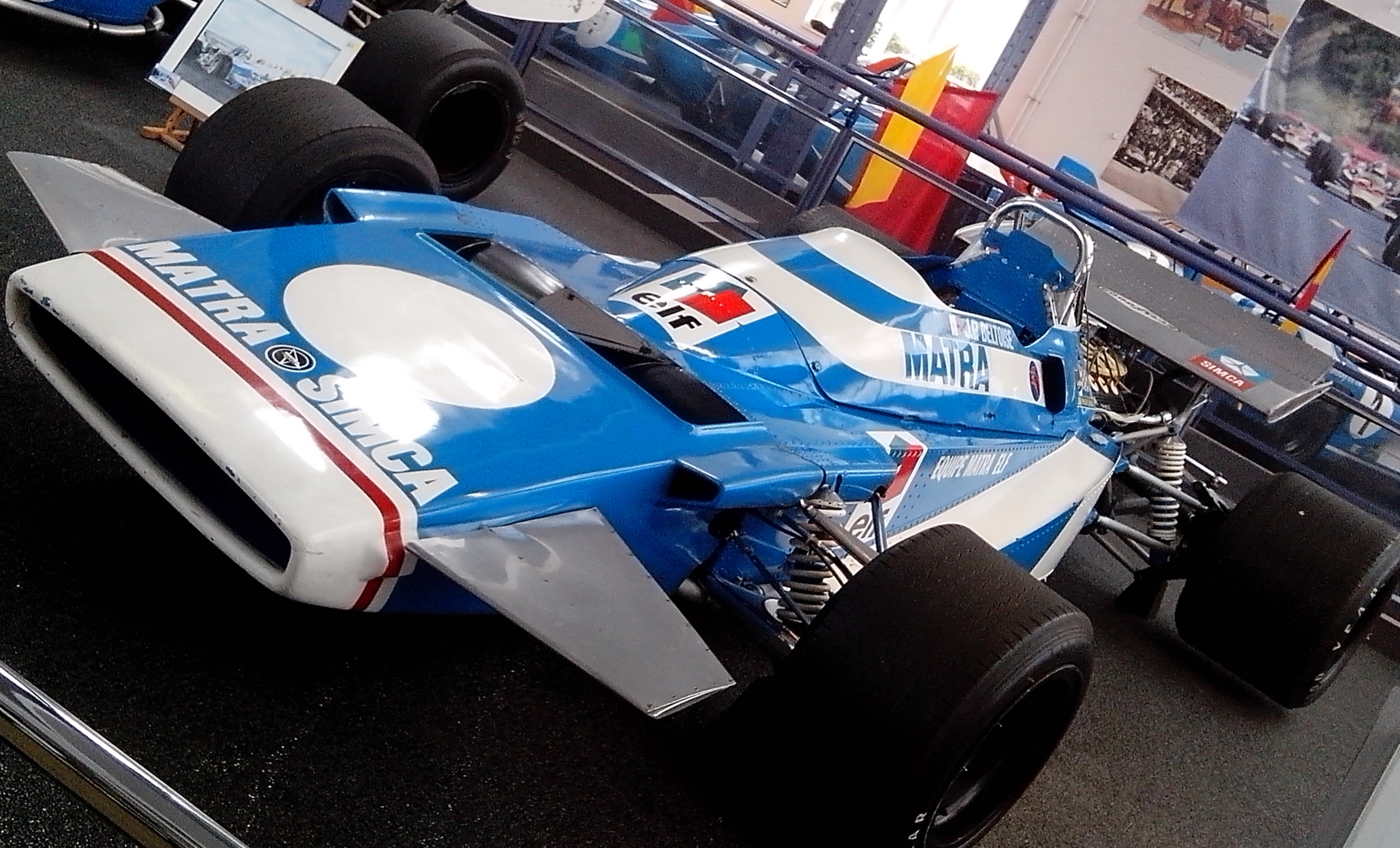 Collection de l'Espace Automobiles Matra